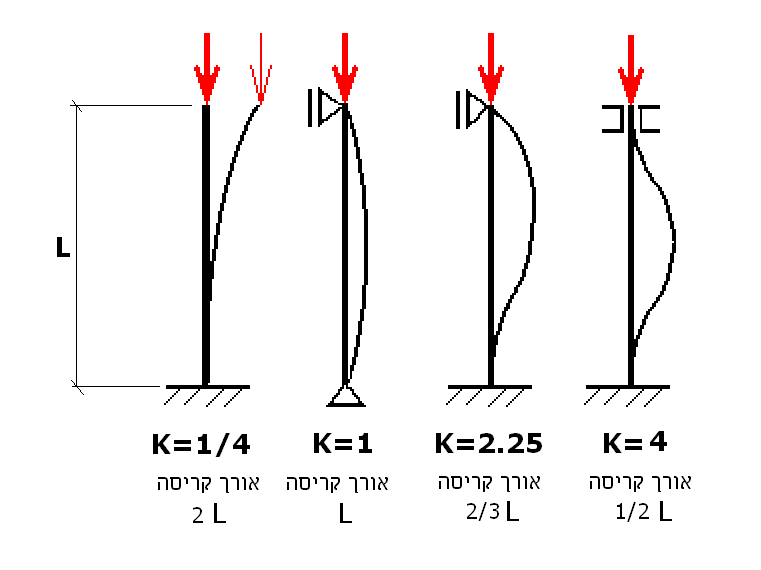 אורך קריסה במוטות. התרשים הוסב מהוויקיפדיה בגרמנית. י.ש. 13:59, 28 מאי 2006 (IDT)